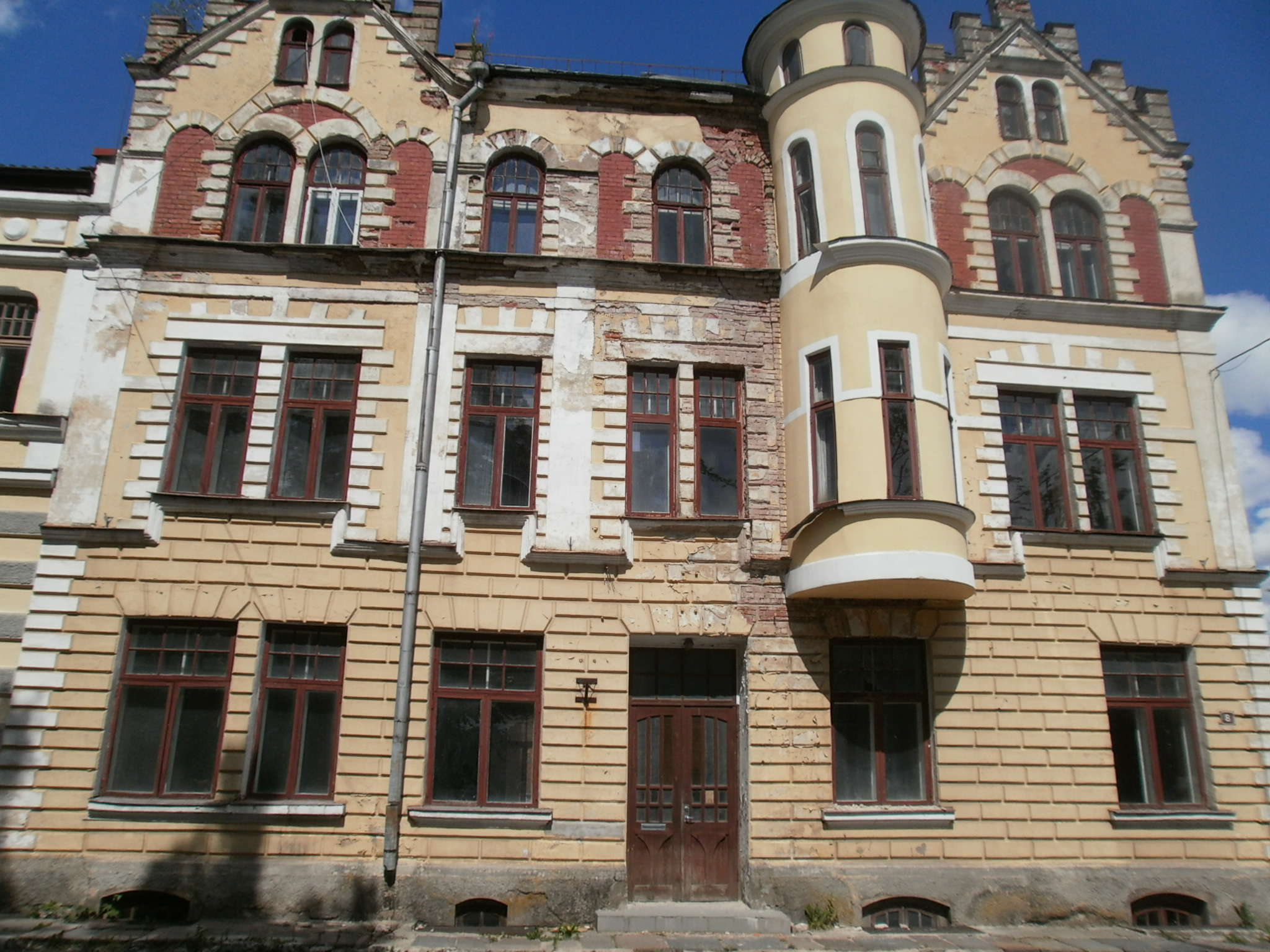 Otsevaade peahoonele Laidoneri platsilt.